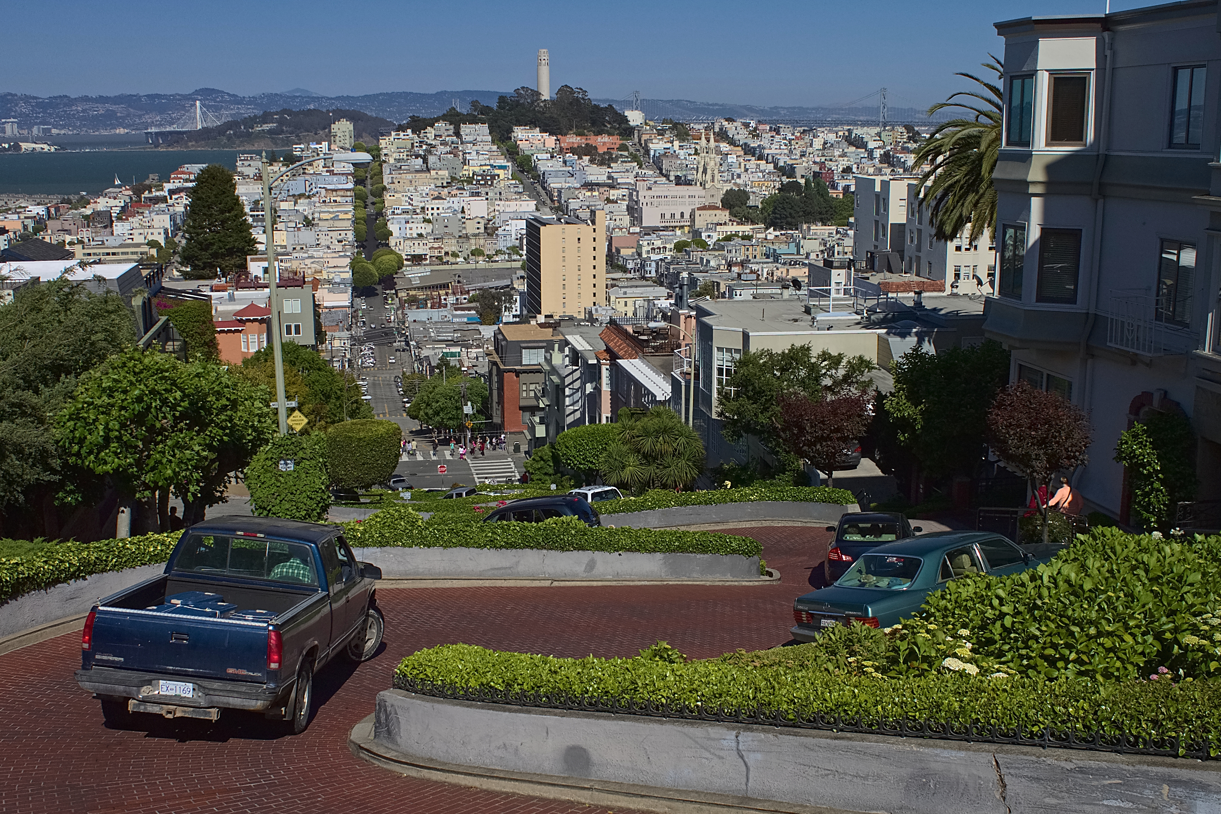 Lombard Street est mondialement connue pour un bloc spécifique sur Russian Hill entre Hyde Street et Leavenworth Street, le long duquel la chaussée est constituée de huit virages très serrés qui lui ont permis d'obtenir la distinction de « la route la plus sinueuse des États-Unis ». La conception sinueuse a été suggérée par le propriétaire foncier Carl Henry afin de réduire la pente de 27%, trop abrupte pour que la plupart des véhicules puissent la remonter. Elle était également un réel danger pour les piétons. Cette pente a été réduite à 16% d'inclinaison. La partie sinueuse de cette rue est pavée de brique et est réservée à un usage à sens unique, en descendant.